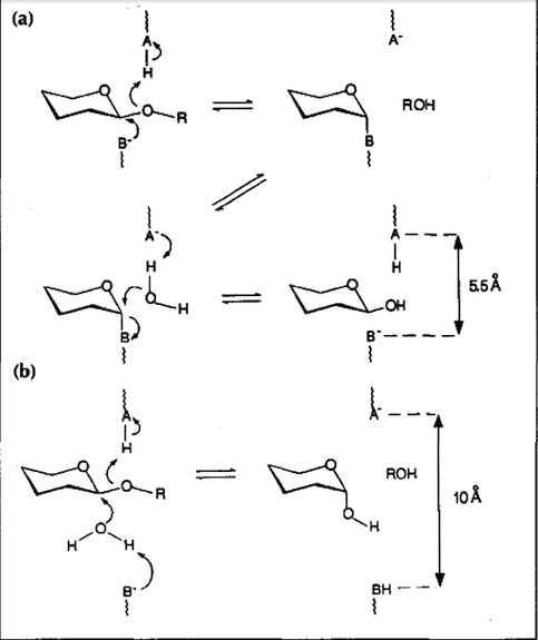 Tsellulaaside hulgas eristatakse toimemehhanismi alusel nelja gruppi ensüüme. Oksüdatiivsed tsellulaasid teevad tselluloosi ahelasse katkeid, kuhu saavad seostuda eksotsellulaasid (oksüdeeritud suhkrud tähistatud punasega). Eksotsellulaasid alustavad tselluloosi hüdrolüüsi ahelate otstest, samas kui endotsellulaasid hüdrolüüsivad tselluloosi juhuslikust positsioonist ahelas. β-glükosidaasid lagundavad ekso- ja endotsellulaaside poolt toodetud tsellooligosahhariide ja tsellobioosi glükoosiks